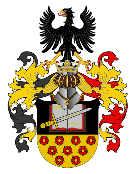 Wappen des Adelsgeschlechtes Nitsche von Hohenplan nach dem Gothaischen Genealogischen Handbuch, adlige Häuser, Eintragung Nitsche von Hohenplan, S. 432 - 433